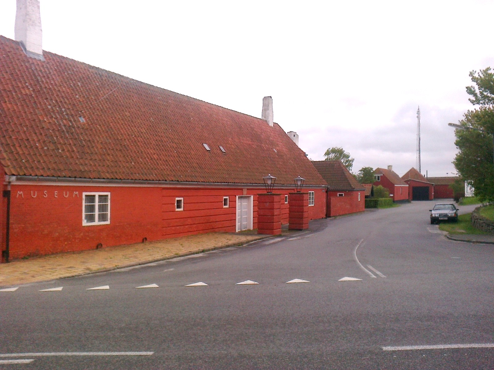 Gudhjem Station, vejside